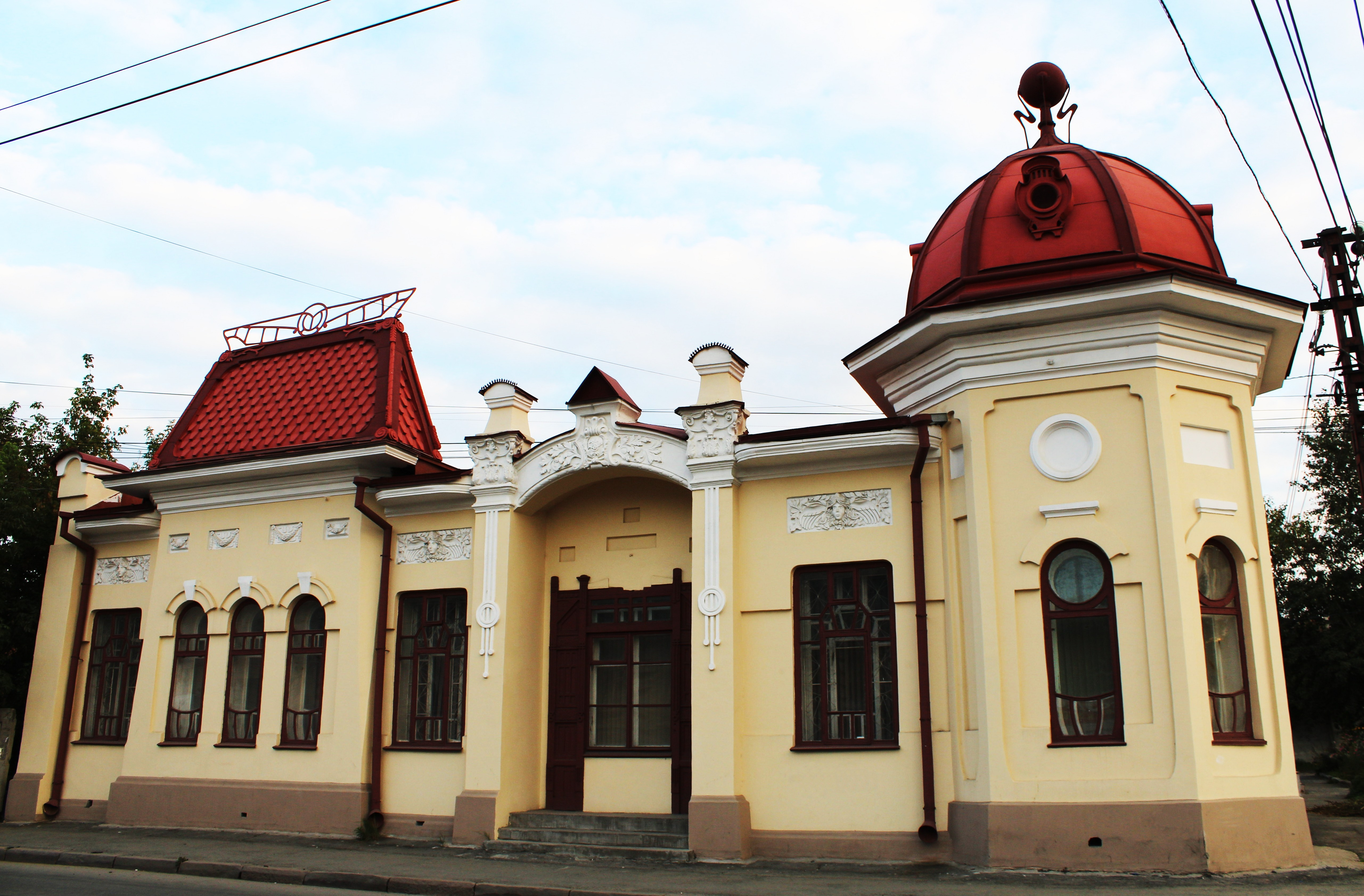 Особняк Бреслина (Челябинская область, Челябинск, Пушкина улица, 1 (улица Труда, 87)